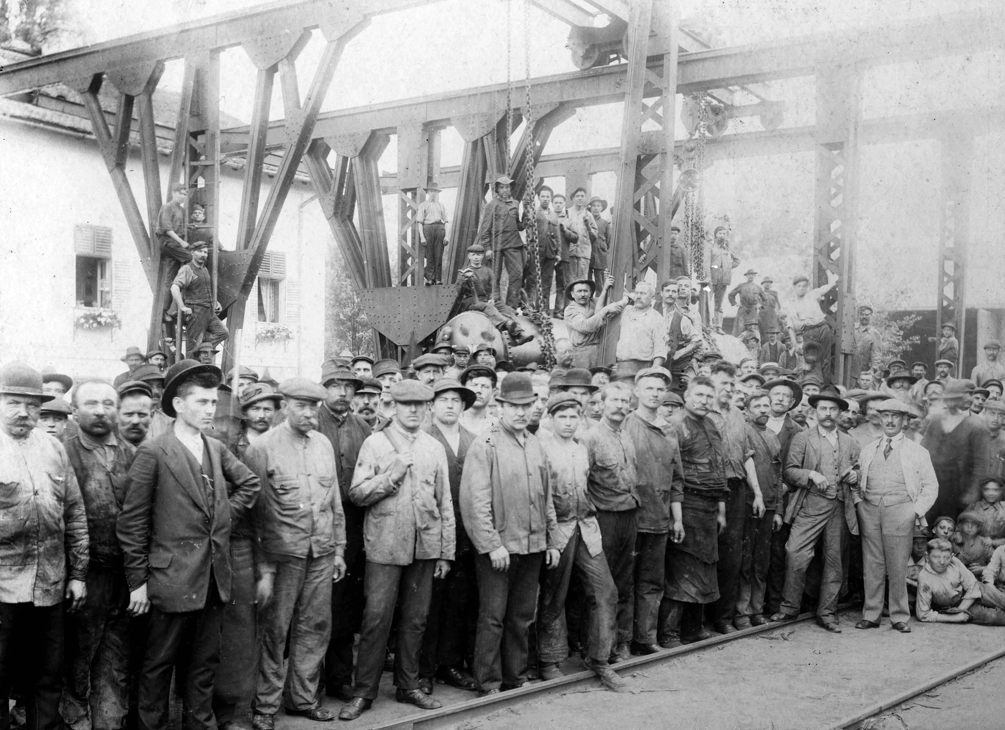 A Ganz és Társa hajógyár munkásai 1902-ben. Tags: shipbuilding industry, heavzy industry, worker, tableau, Ganz-brand Title: A Ganz és Társa hajógyár munkásai 1902-ben.